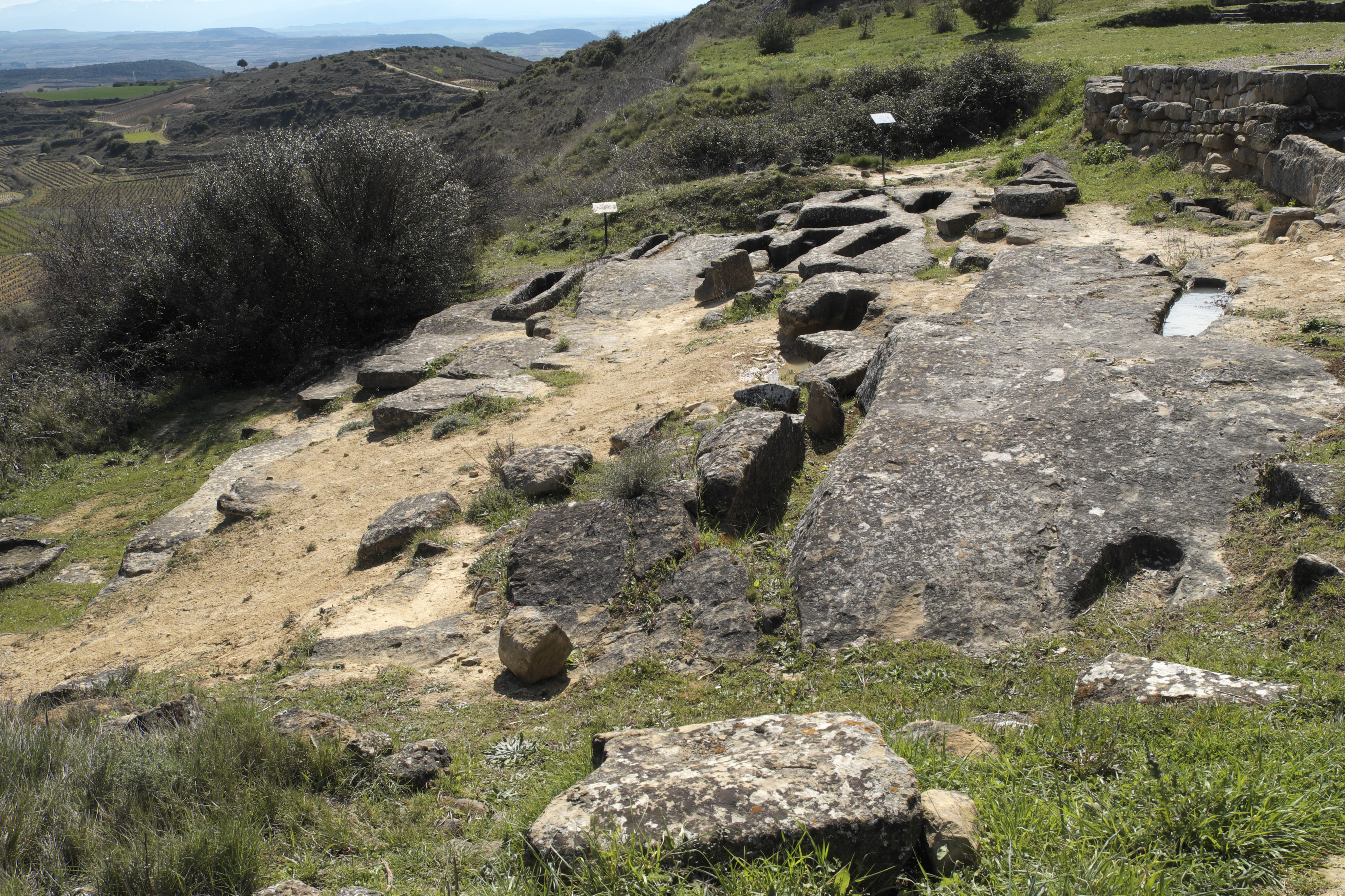 Anthropomorphe Gräber an der Kapelle Santa María de La Piscina in Peciña in der spanischen autonomen Gemeinschaft La Rioja